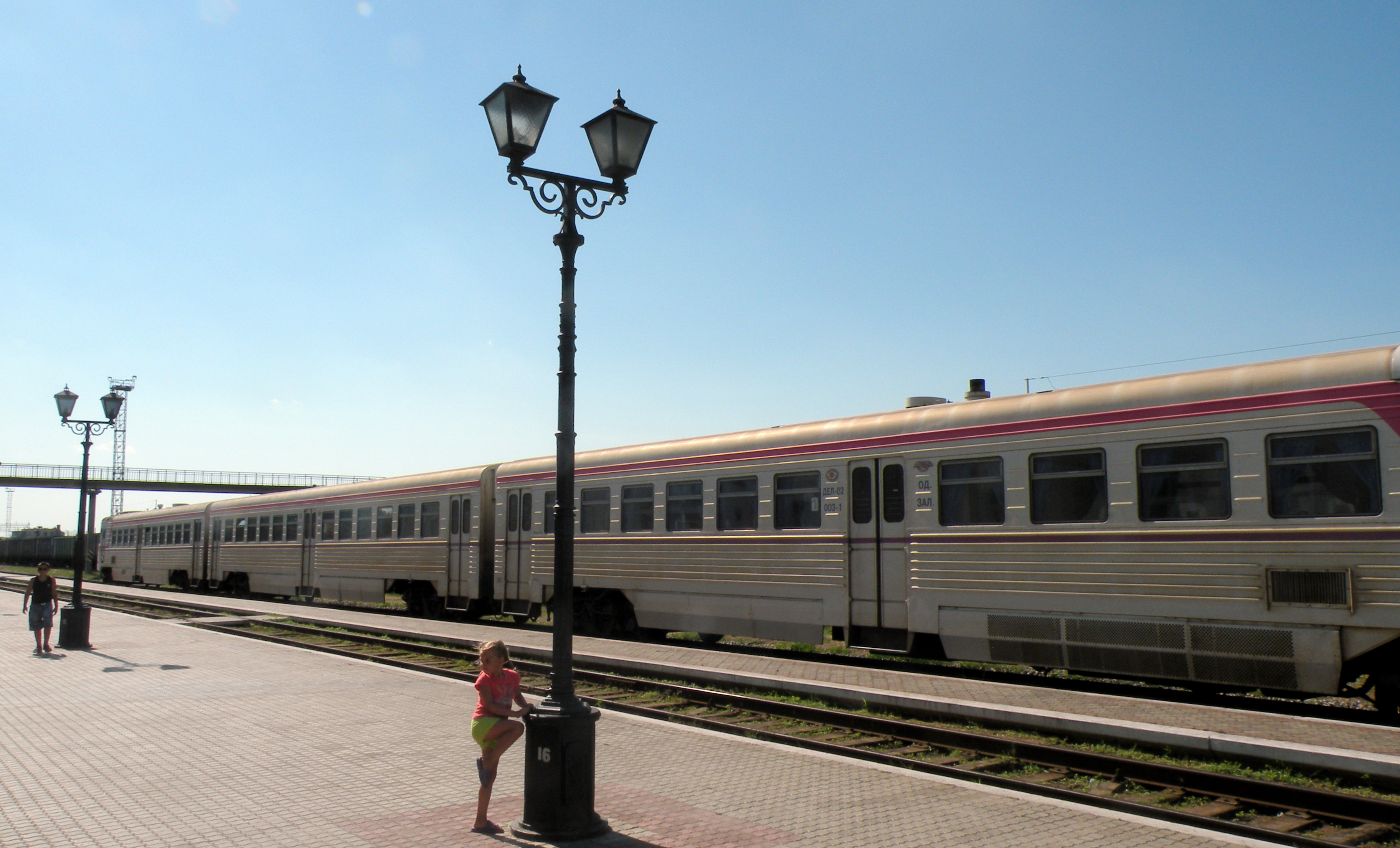 Дизель-поезд ДЭЛ-02 на вокзале города Керчь